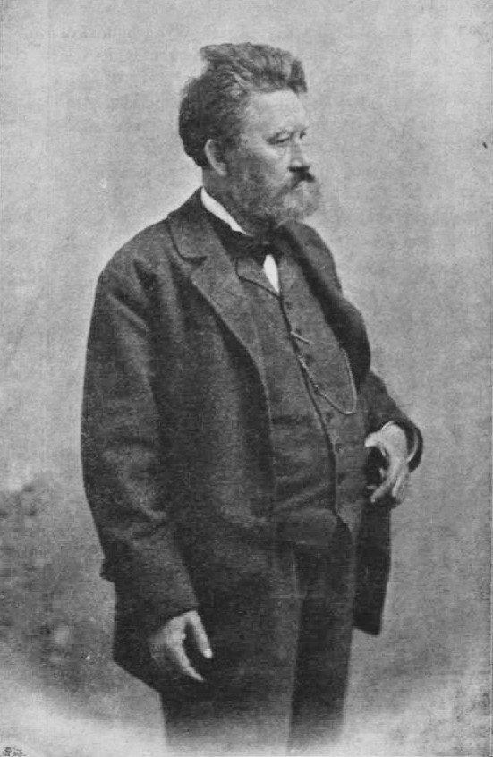 Székely Bertalan (1935–1910) festőművész portréja. Erdélyi Mór fényképfelvétele (1900)